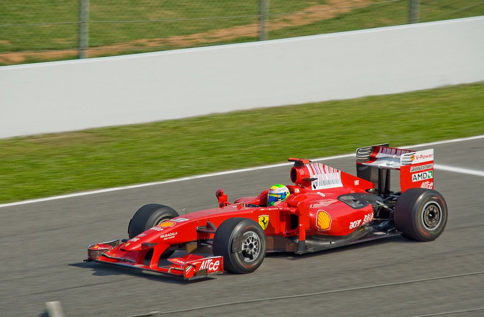 Nikon D90 + Sigma 18-200 DC OS HSM 1/320s - F/10 - 155mm - ISO400